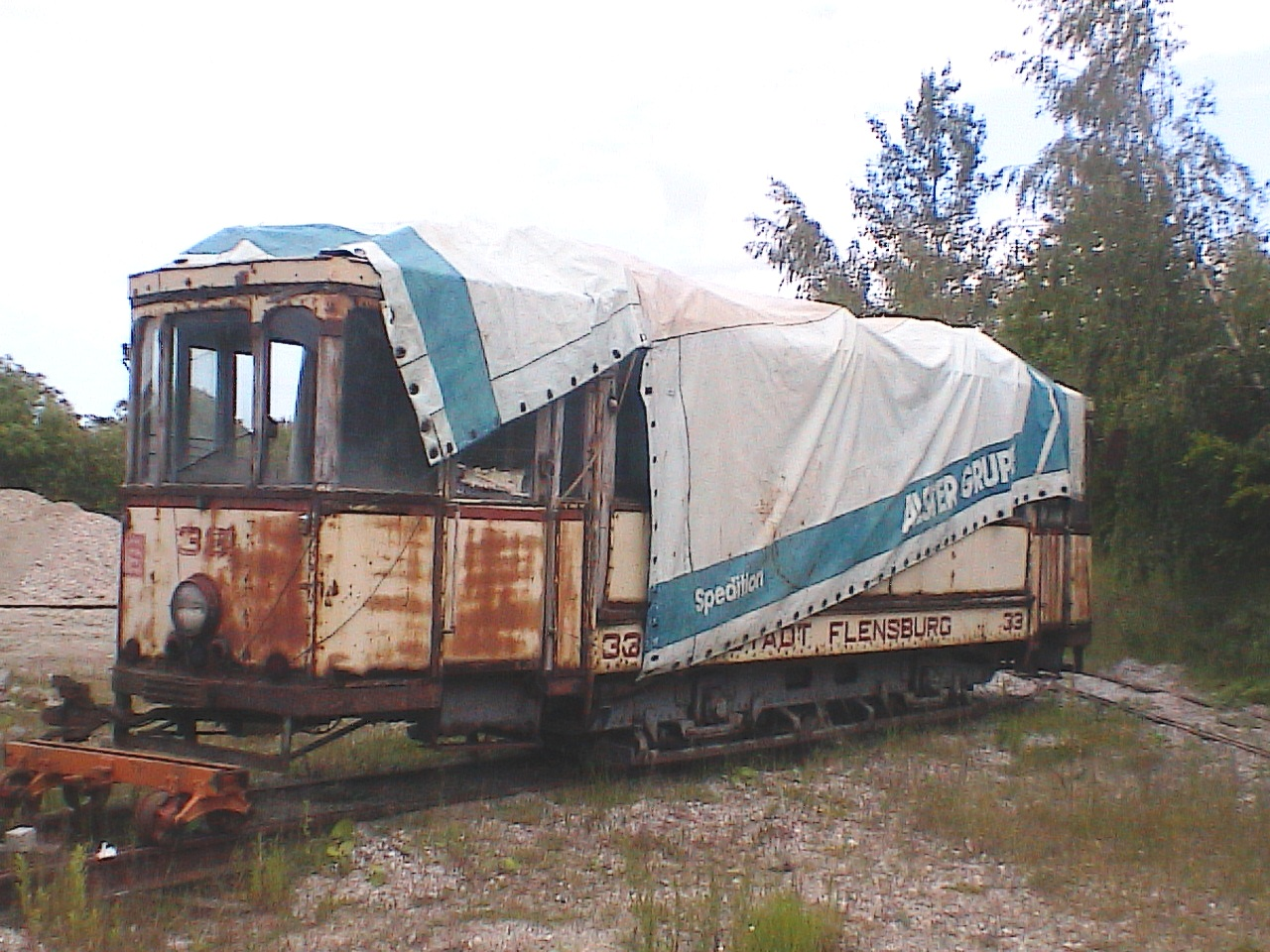 Wagen 33 der Flensburger Strassenbahn im dänischen Straßenbahnmuseum Skjoldenæsholm